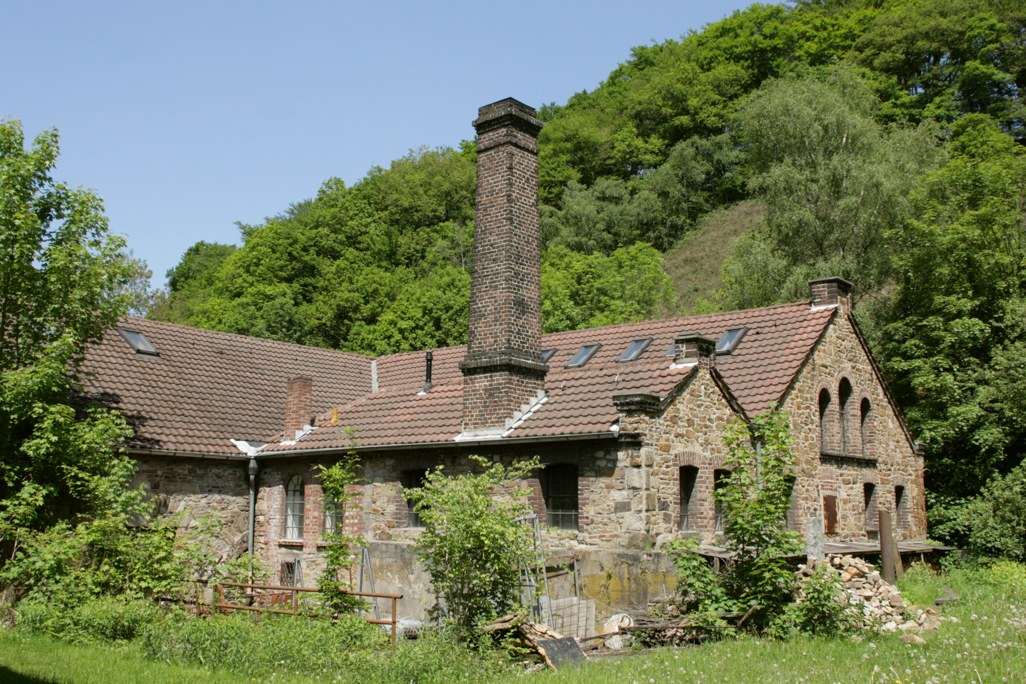 Kupferhammer, Nierenhofer Straße 10A in Essen-Kupferdreh